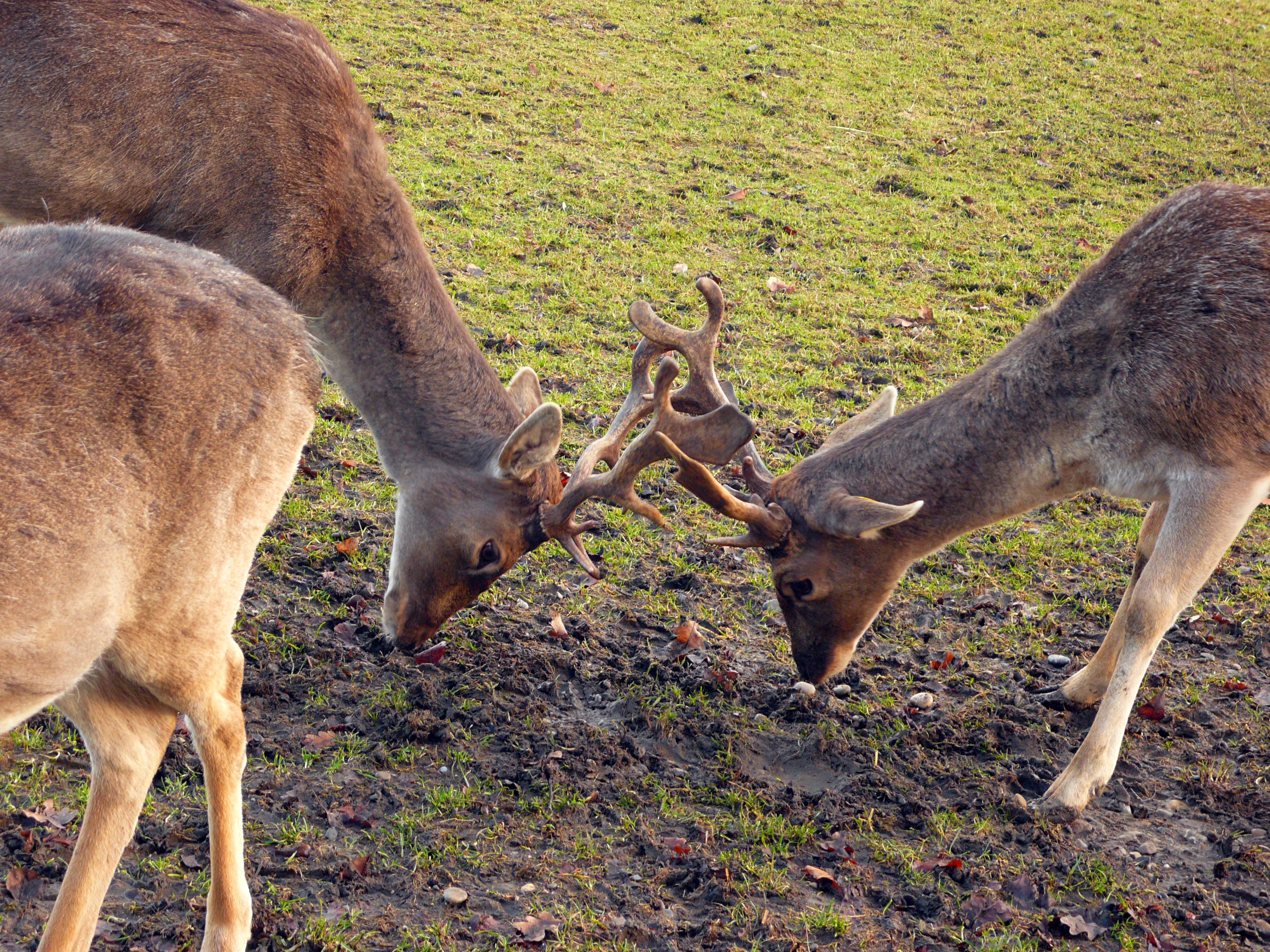 Fighting young male stags